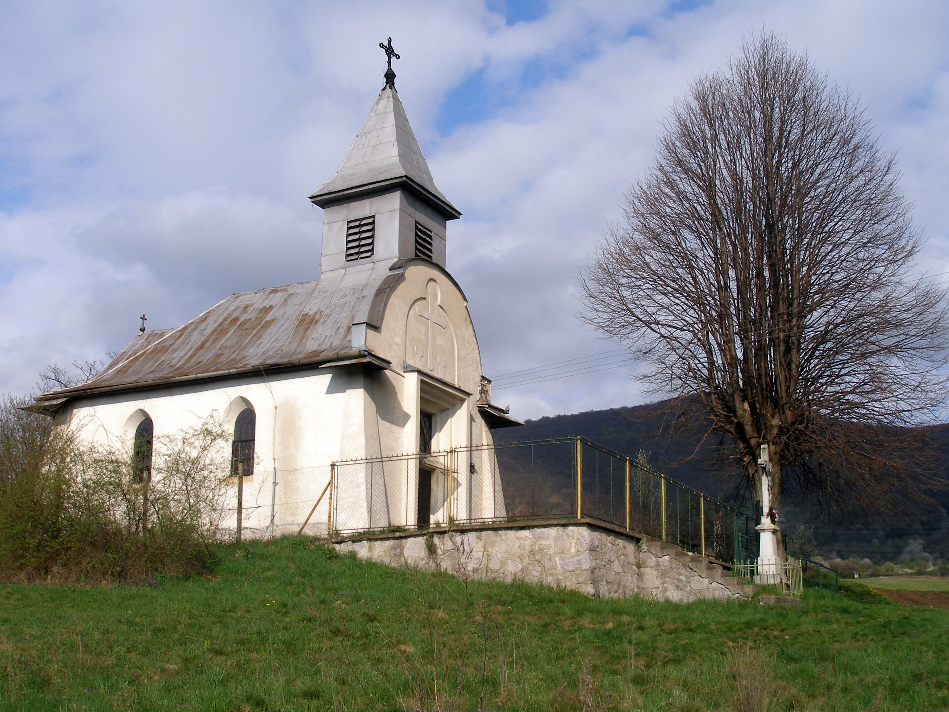 Obec Mirkovce okres Prešov región Šariš